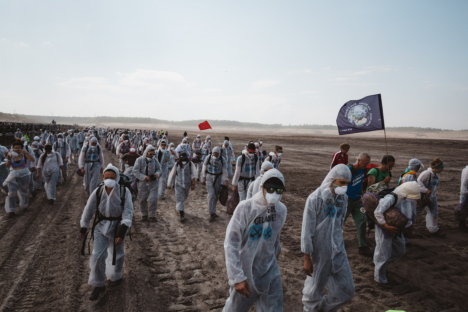 Ende Glände im Tagebau Welzow Süd, creative commons EG2016